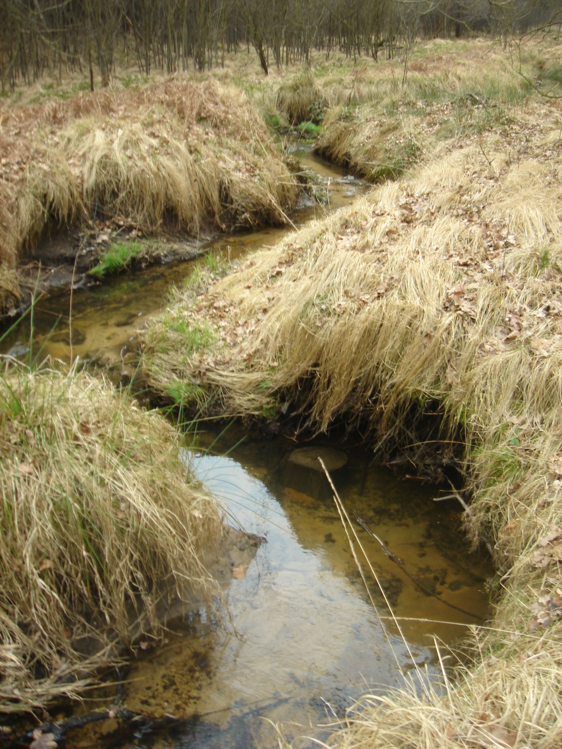 Ruhlandgraben, Dresdner Heide